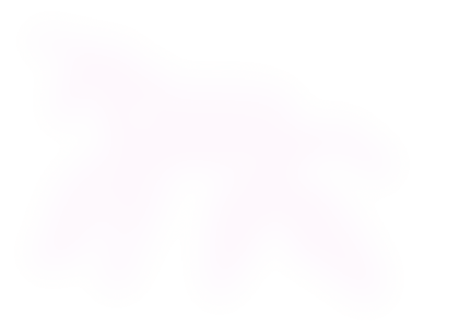 Neviditelný růžový jednorožec Přibližné ztvárnění: che Soubor možná na první pohled vypadá podobný obrázku Invisible Pink Unicorn.png, ale při důkladné analýze lze zjistit klíčové rozdíly, proto prosím nemazat jako totožné.